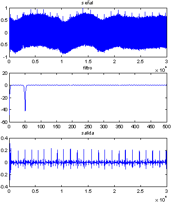 filtro digital Imagen creada por el usuario Murphy sujeta a las condiciones de la licencia GFDL.